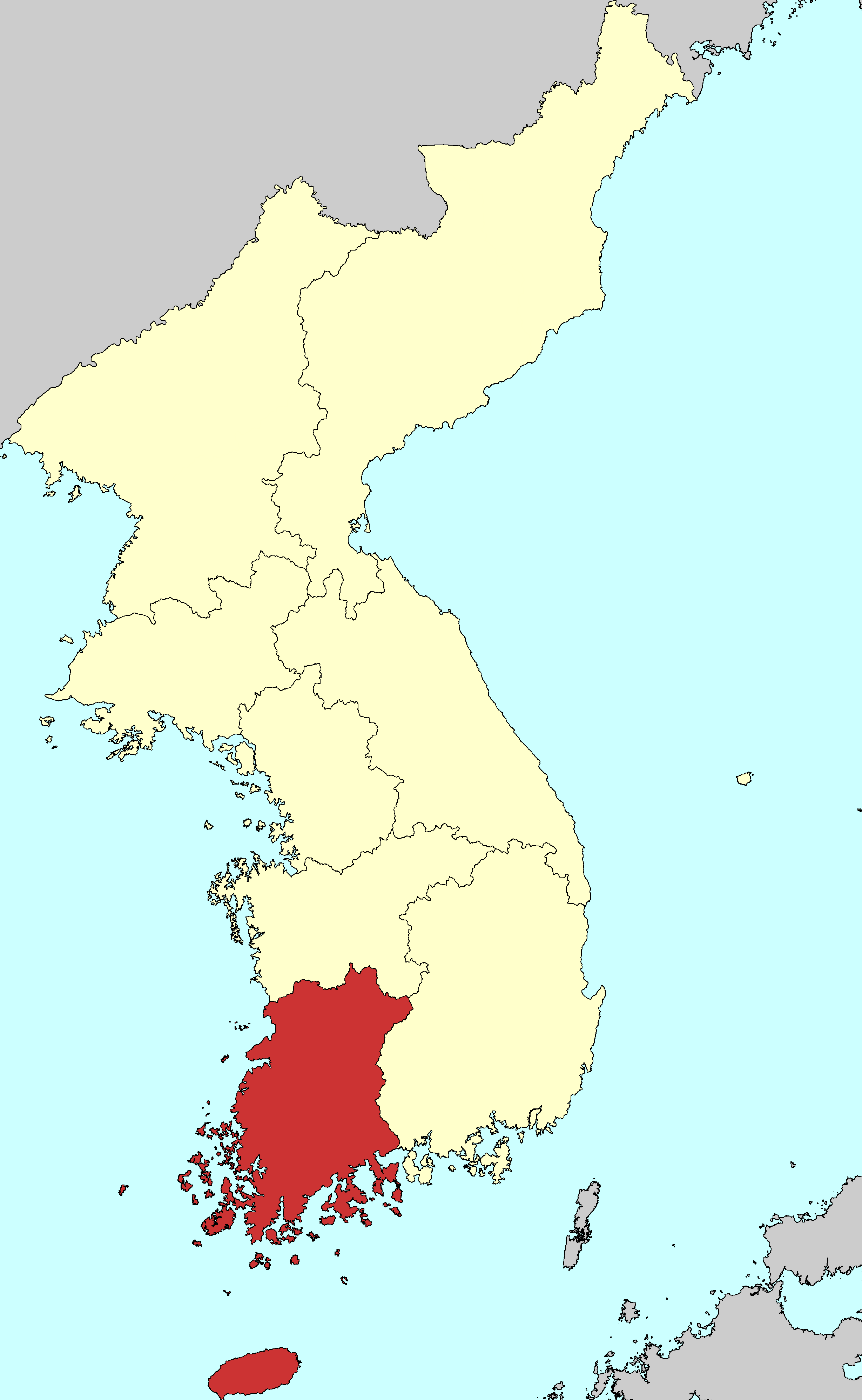 조선후기 전라도